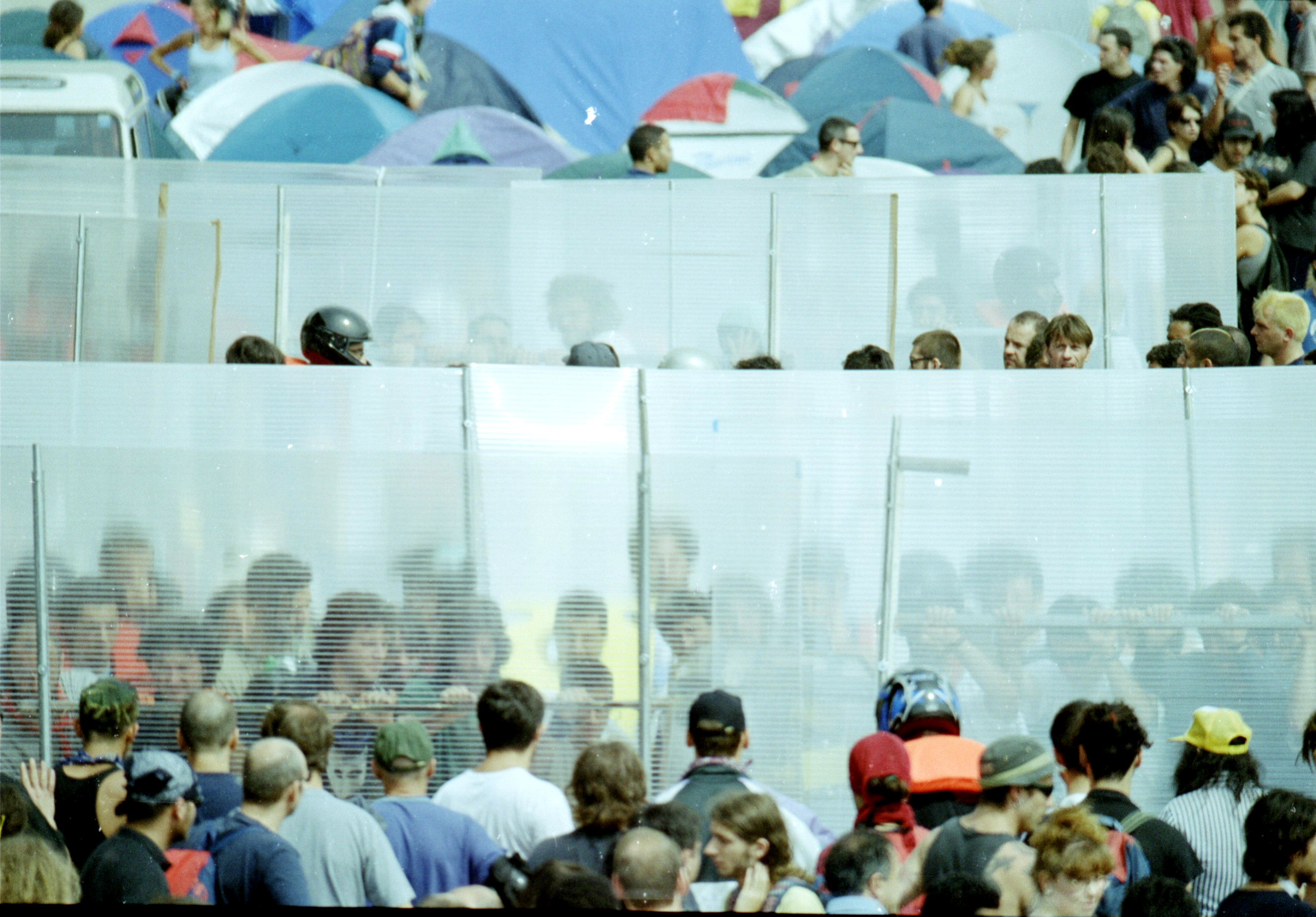 Genova - Fatti del G8 del 20 luglio 2001 Corteo dei disobbedienti con scudi di plastica in Corso Europa